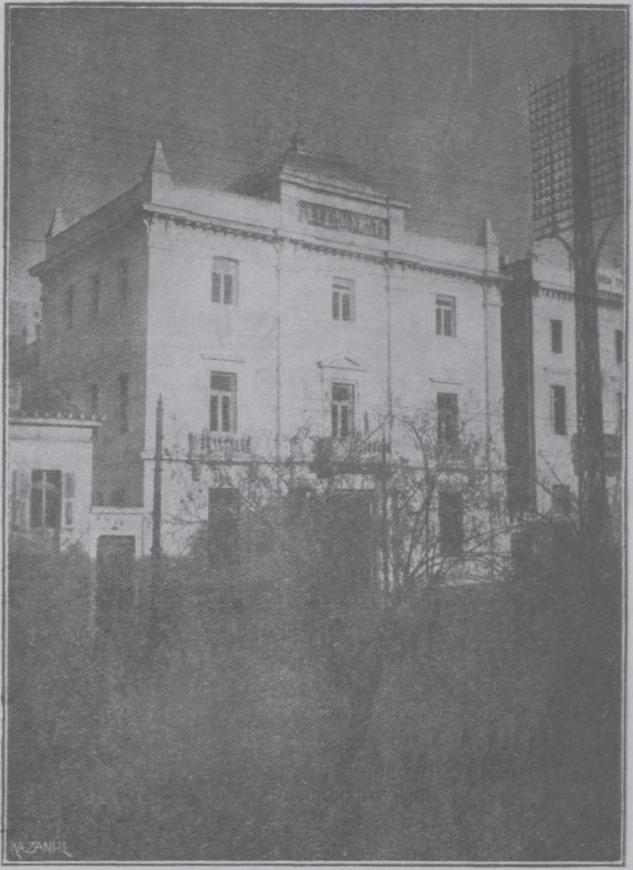 historisches Gebäude in Athen, 19.-20. Jahrhundert